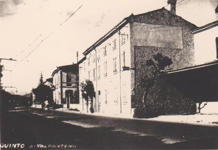 Quinto di Valpantena, 1953. Si nota il binario della tranvia Verona-Grezzana.